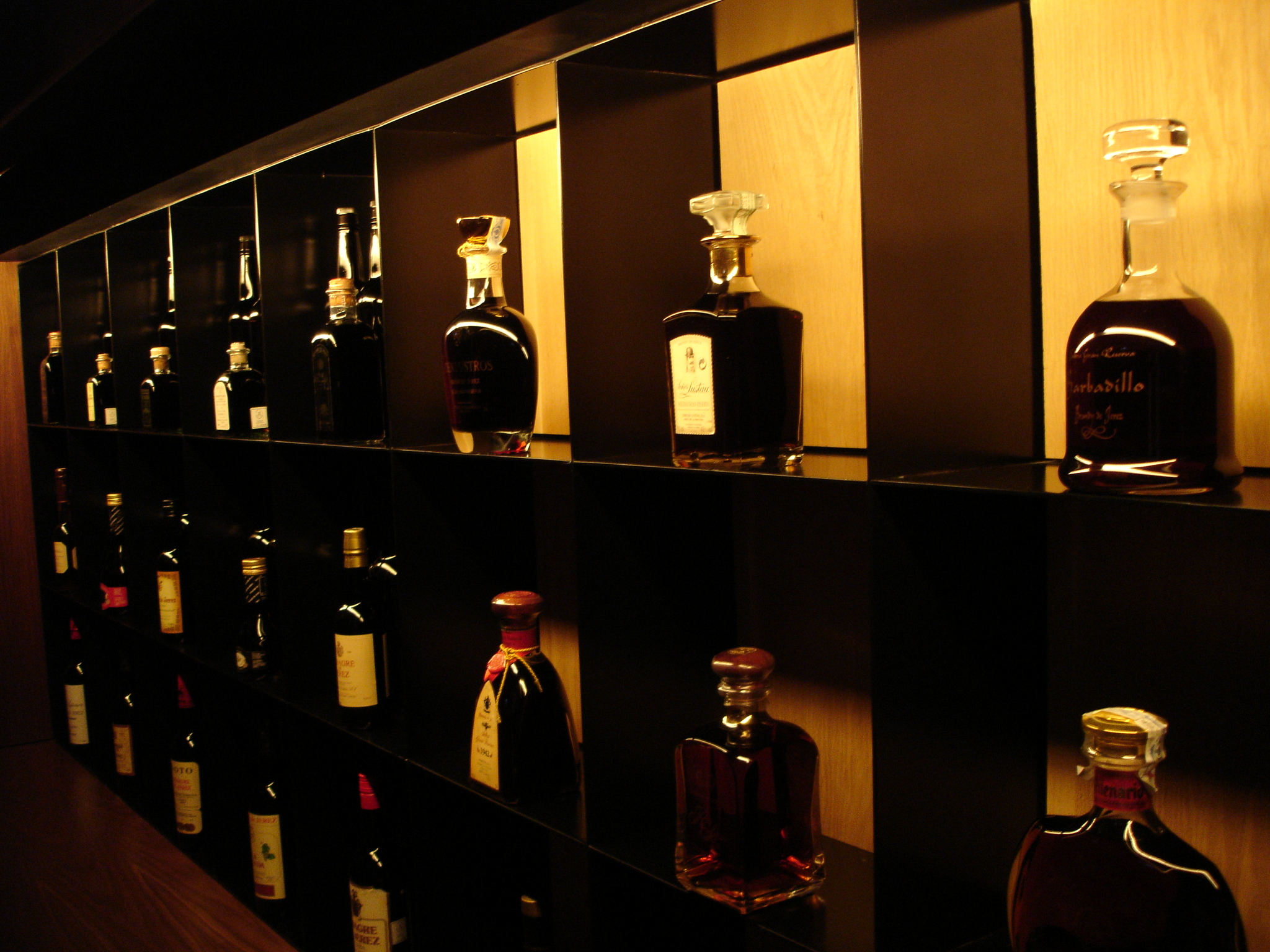 Botella de Brandy de Jerez en el Museo de Jerez de Jerez de la Frontera. Andalusia (Sapin)